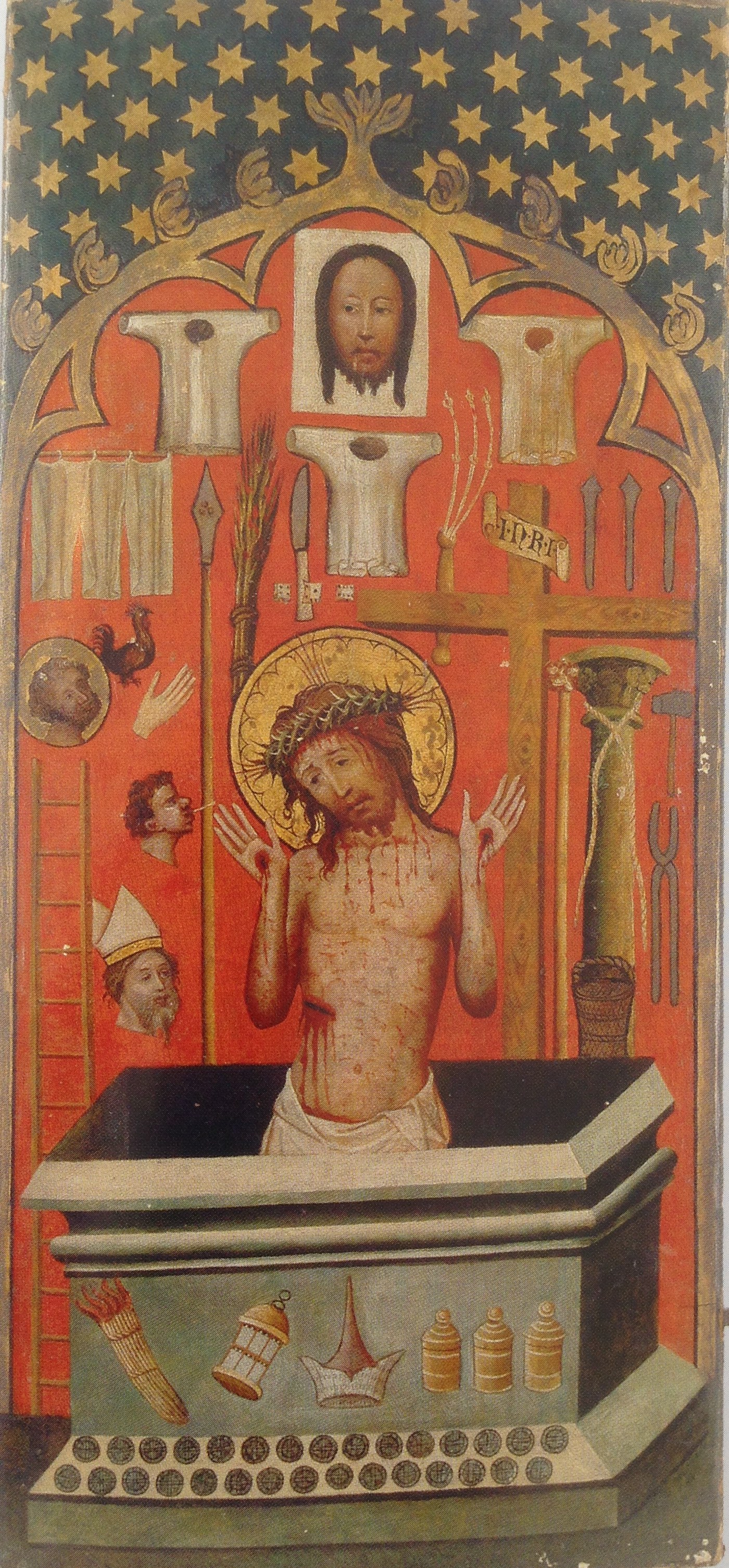 Homme des douleurs et instruments de la Passion